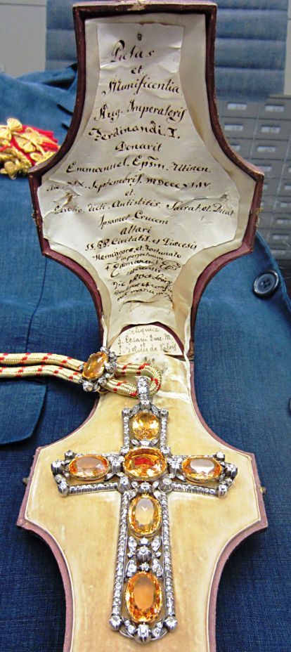 Croce-reliquiario dell'imperatore Ferdinando I d'Austria, contenente reliquie di S. Cesario diacono e martire, Cattedrale di Udine.